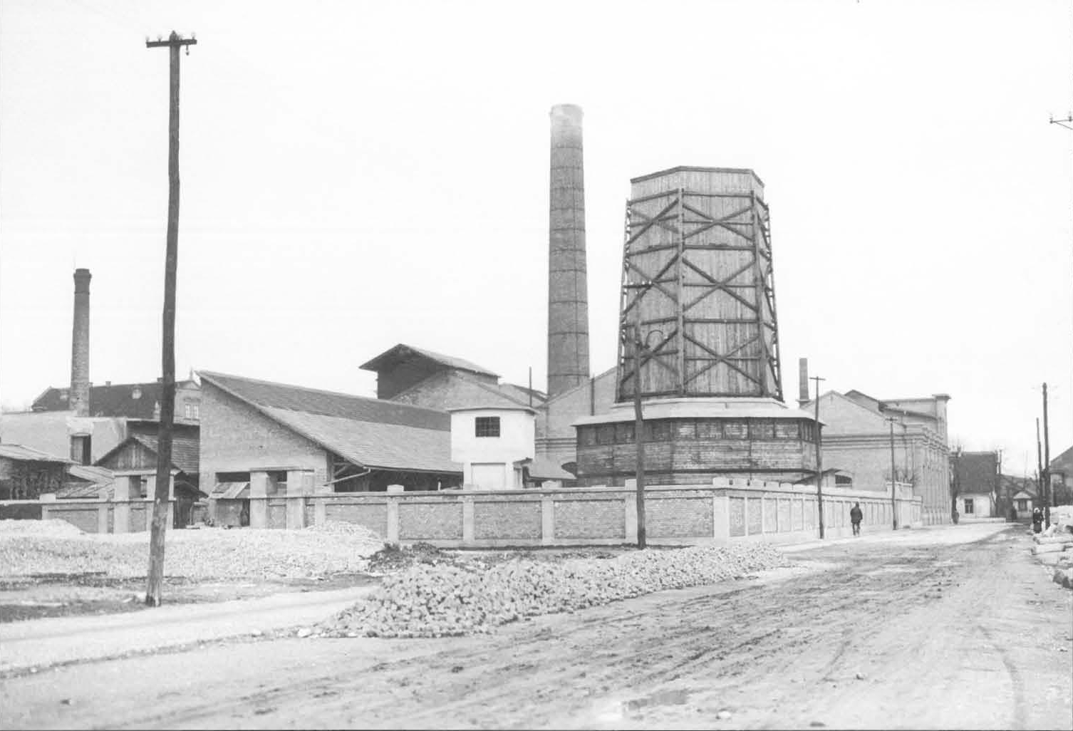 Ljubljanska mestna elektrarna